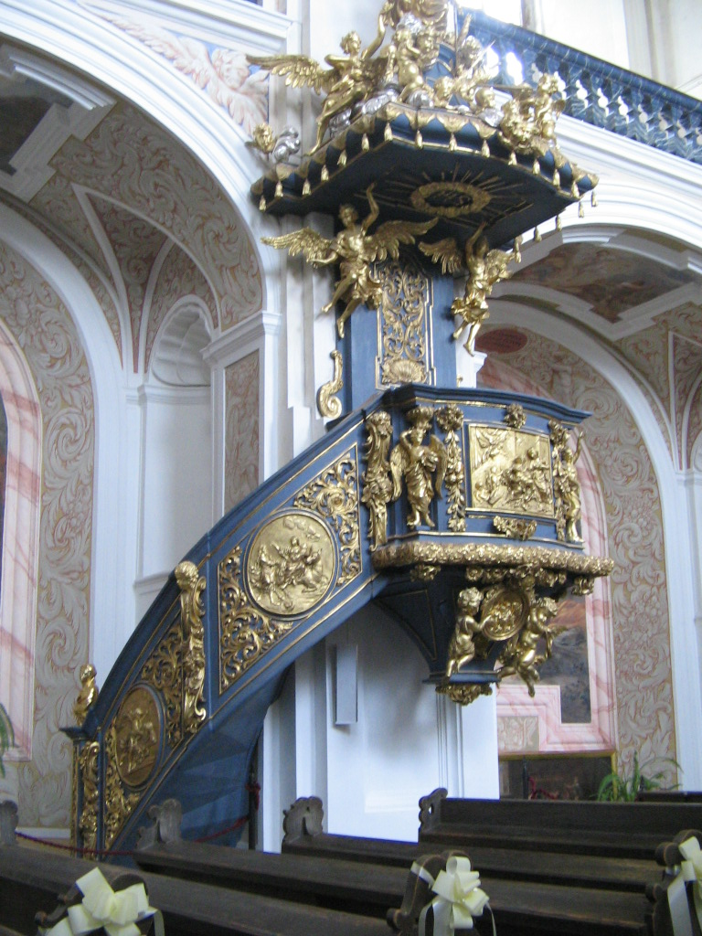 Ambona w kościele w Krzeszowie.